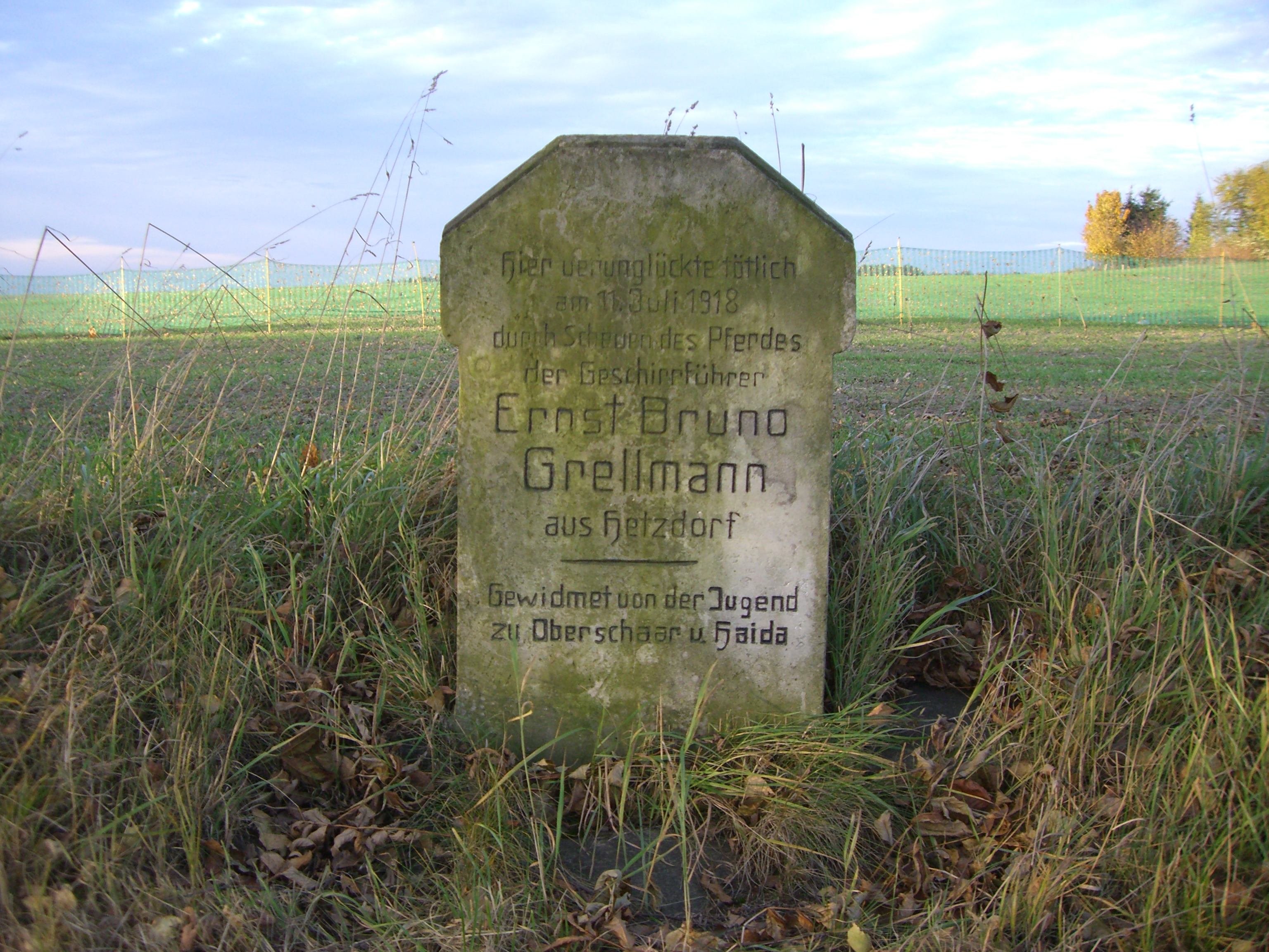 Gedenkstein eine tödlich verunglückten Fuhrmanns von 1918